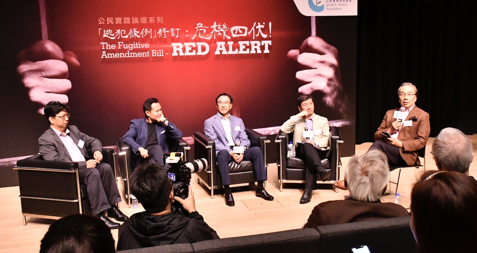 中文（中国大陆）: 香港公民实践培育基金举办逃犯条例修订论坛。